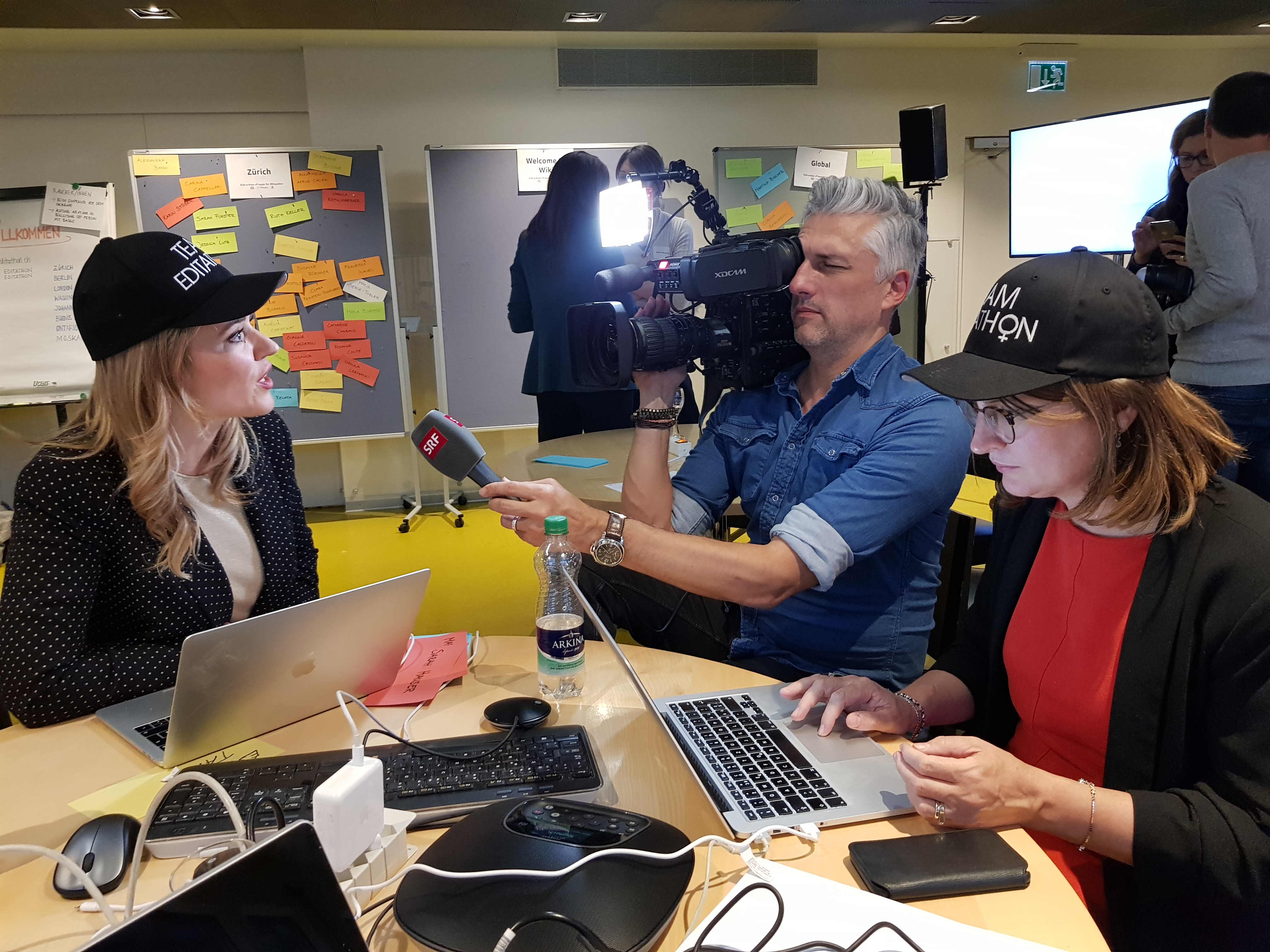 Der Editathon stösst auf mediales Interesse.